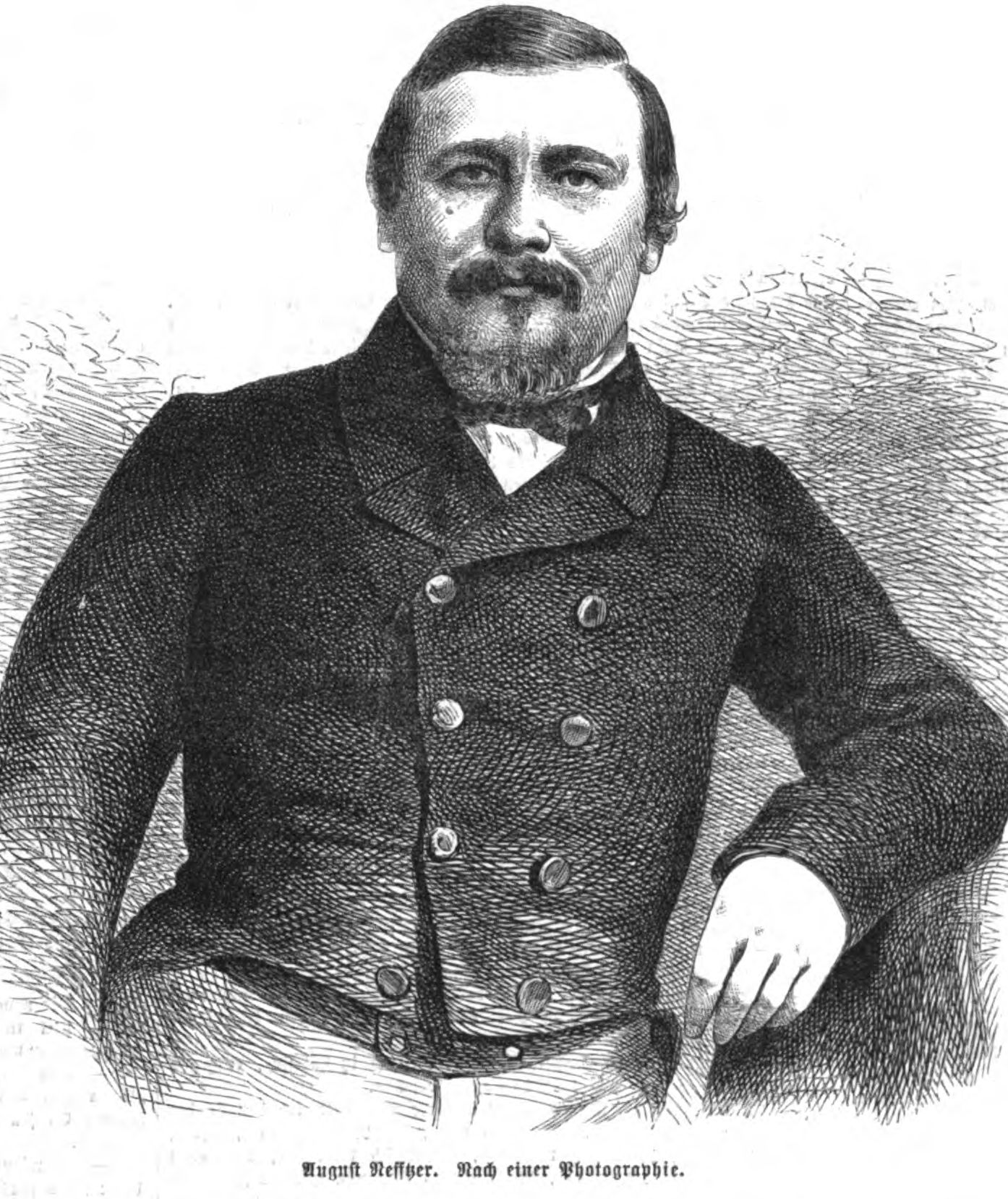 Auguste Nefftzer, französischer (elsässischer) Journalist, im 19. Jh.